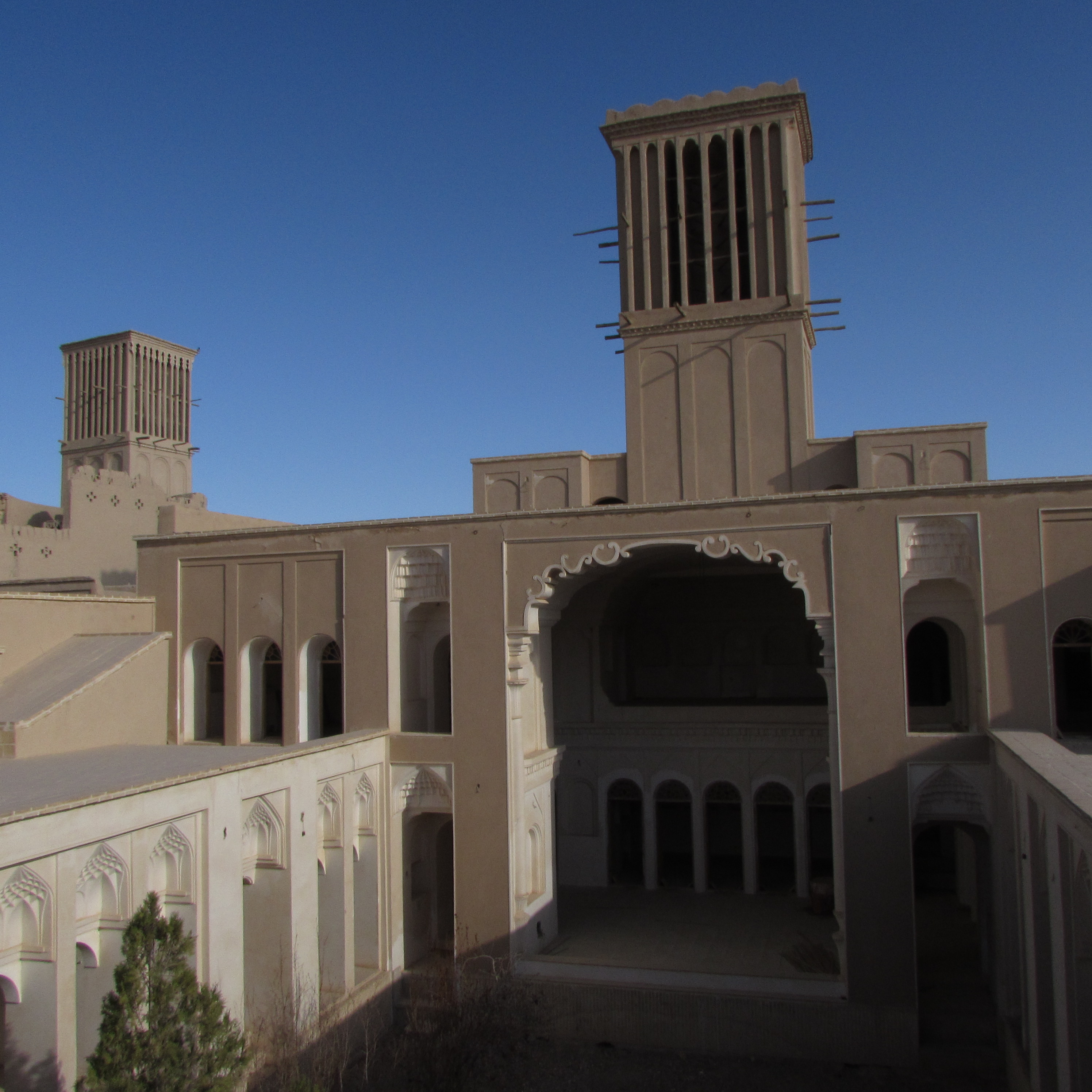 ضلع جنوبی با بادگیر